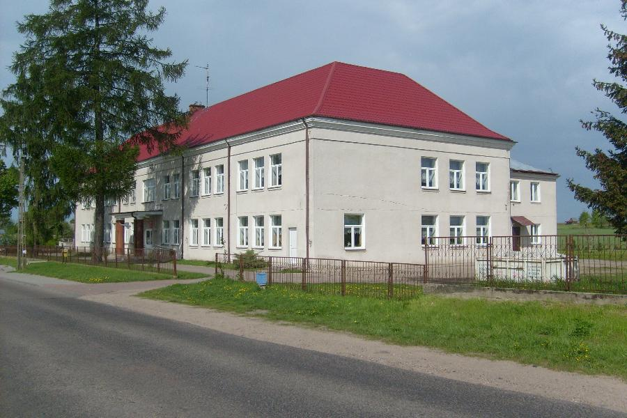 Zespół Szkół Samorządowych w Zabielu